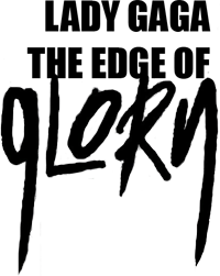 Logo de "The Edge of Glory"